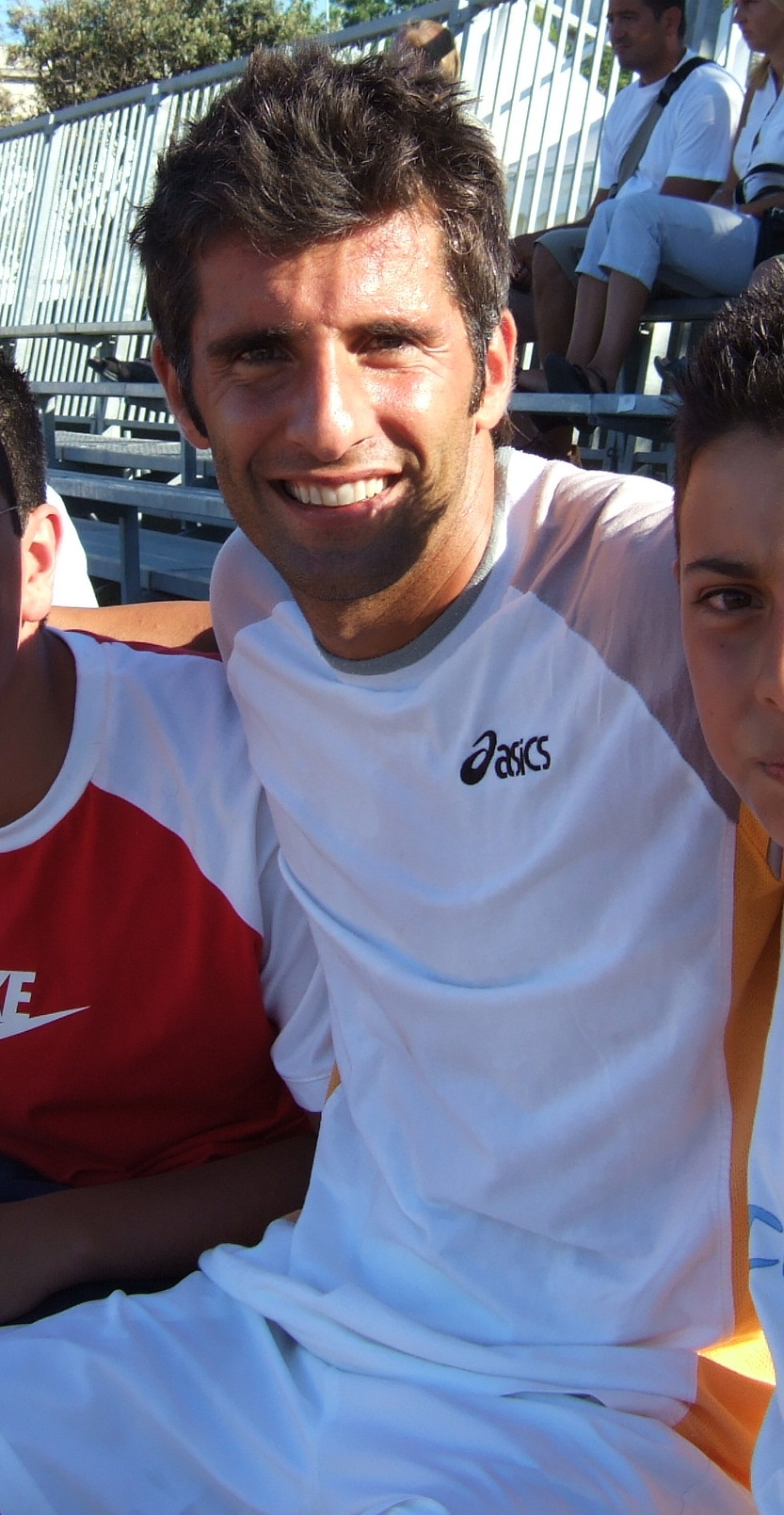 Giorgio Galimberti al Riviera di Rimini Challenger 2006.